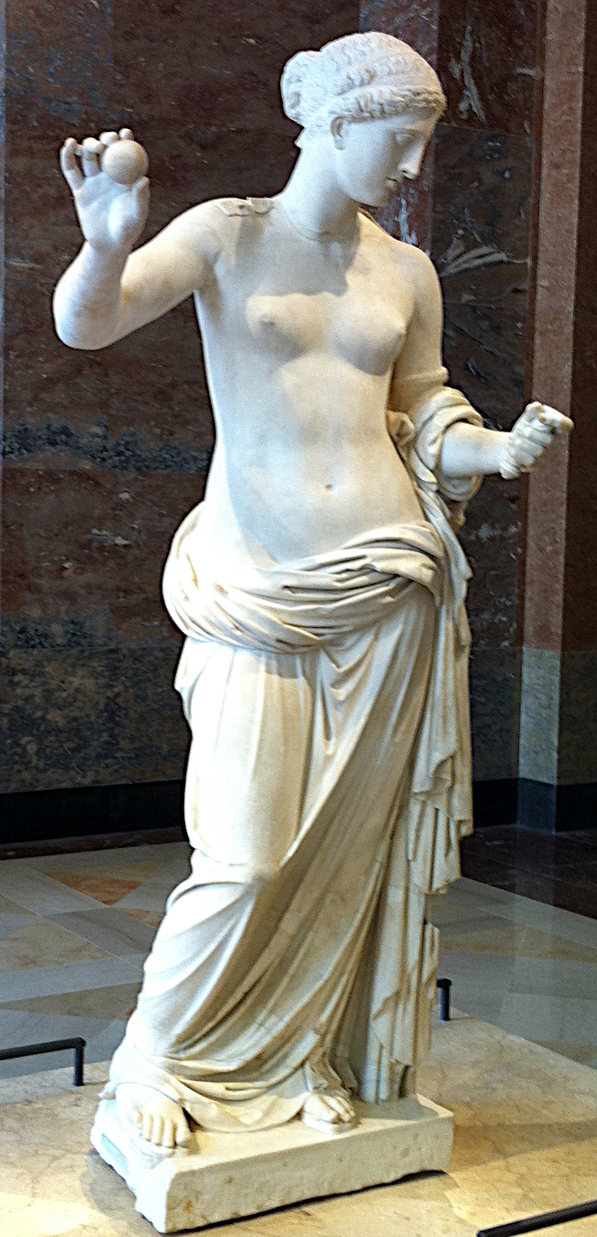 Vénus d'Arles - Le Louvre Galerie Sully - salle 15 - Statue d'Aphrodite, dite Vénus d'Arles. Marbre de l'Hymette, œuvre romaine de l'époque de l'empereur Auguste (fin du Ier siècle av. J.-C.), peut-être une copie de l'Aphrodite de Thespies réalisée par Praxitèle (360 av J.-C.). La pomme et le miroir sont des ajouts de Girardon réalisés au XVIIe siècle. Découverte en 1651 dans le théâtre antique d'Arles, France.